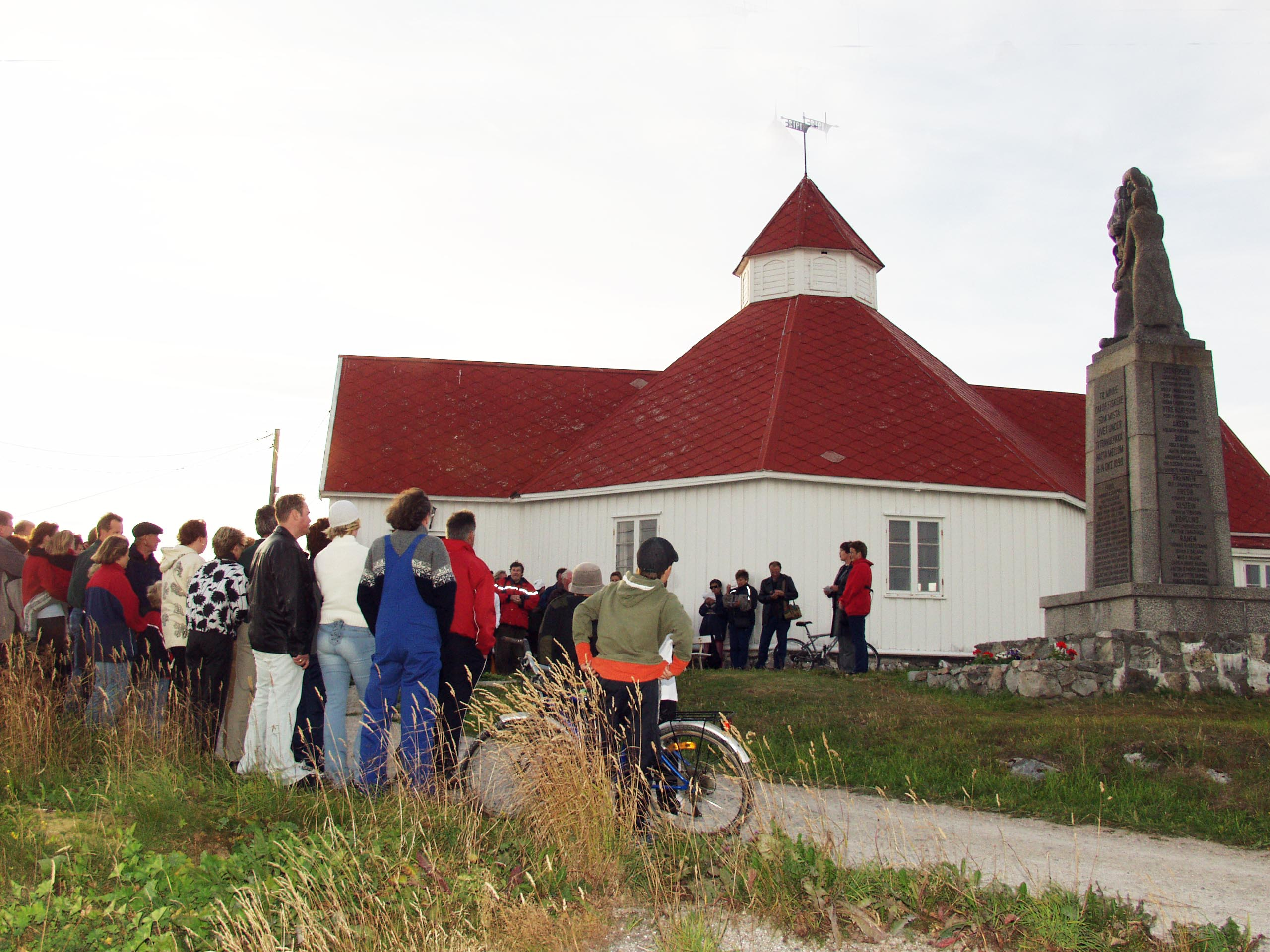 "Oscar Tybring"-seilasen 19. juli 2002. "Erik Bye" er nettopp ankommet med bl.a. generalsekretær Anne Enger Lahnstein som skal legge ned blomster ved Titran-monumentet.